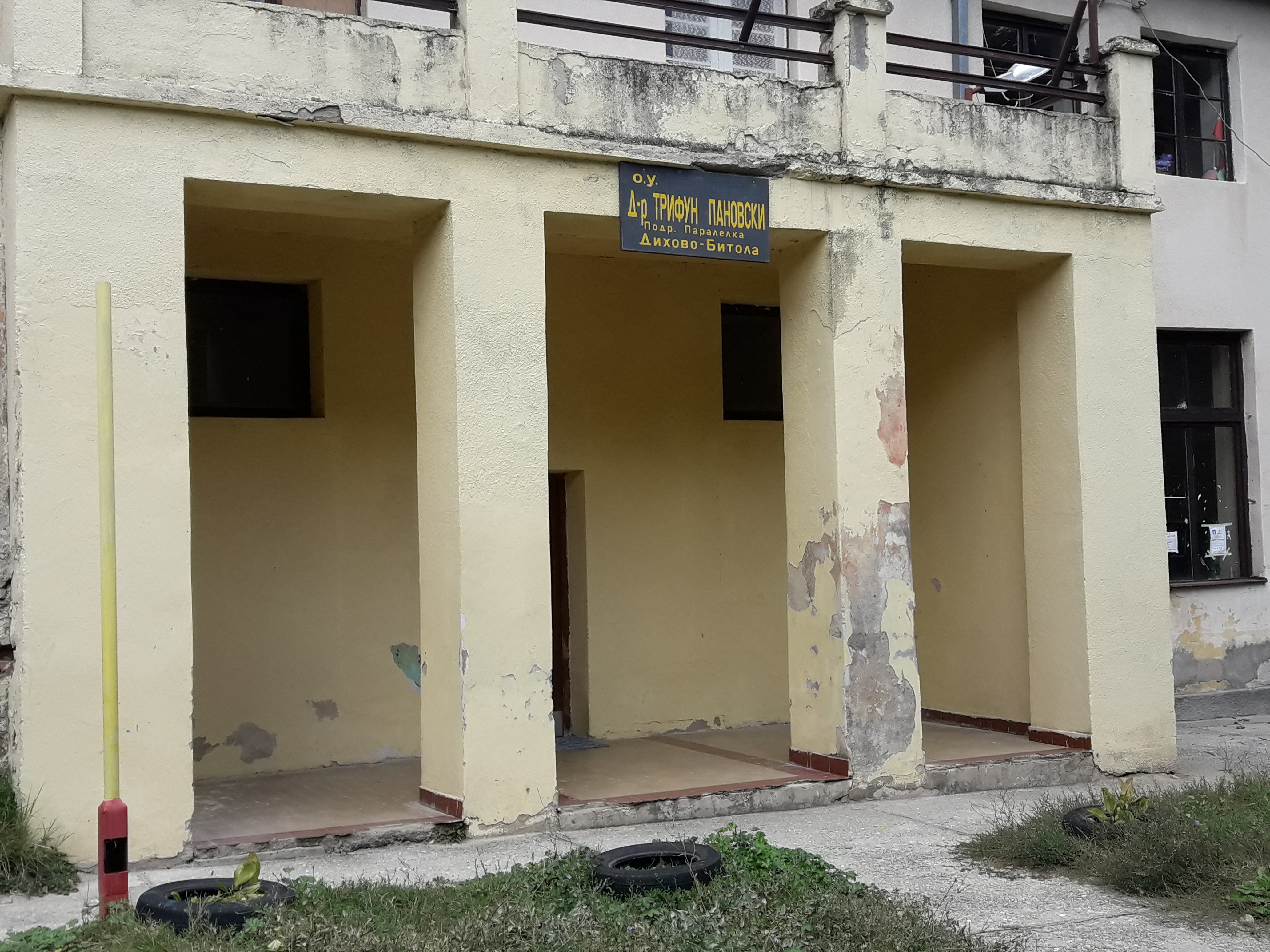 Основното училиште Д-р Трифун Пановски во селото Дихово, Битолско.